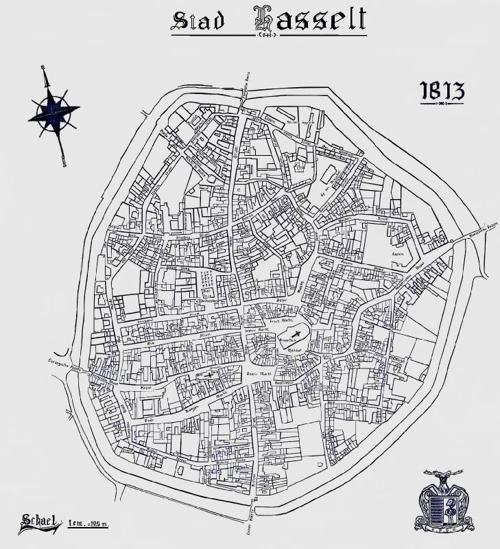 Kaart van Hasselt in 1813